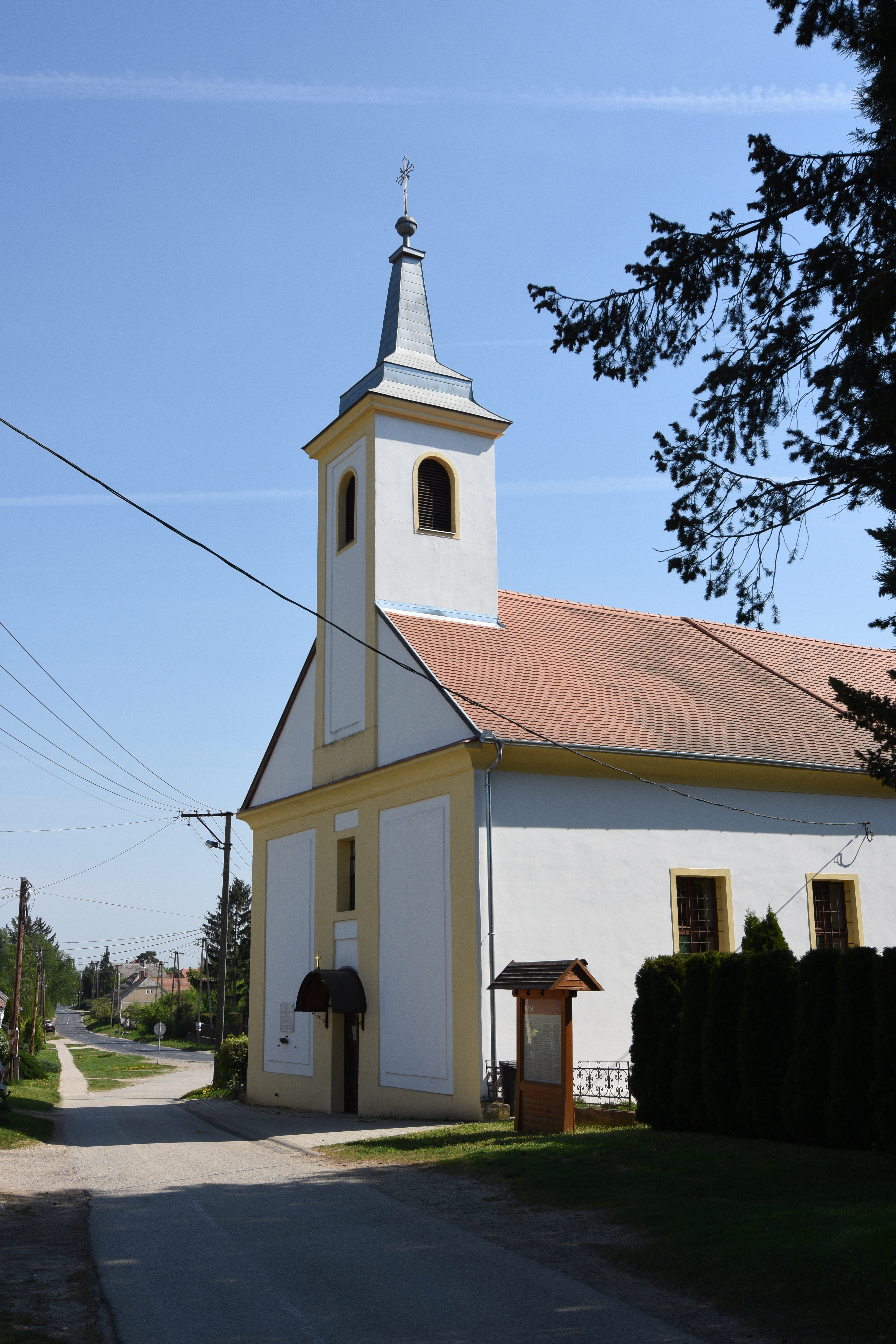 Roman Catholic Church in Kám